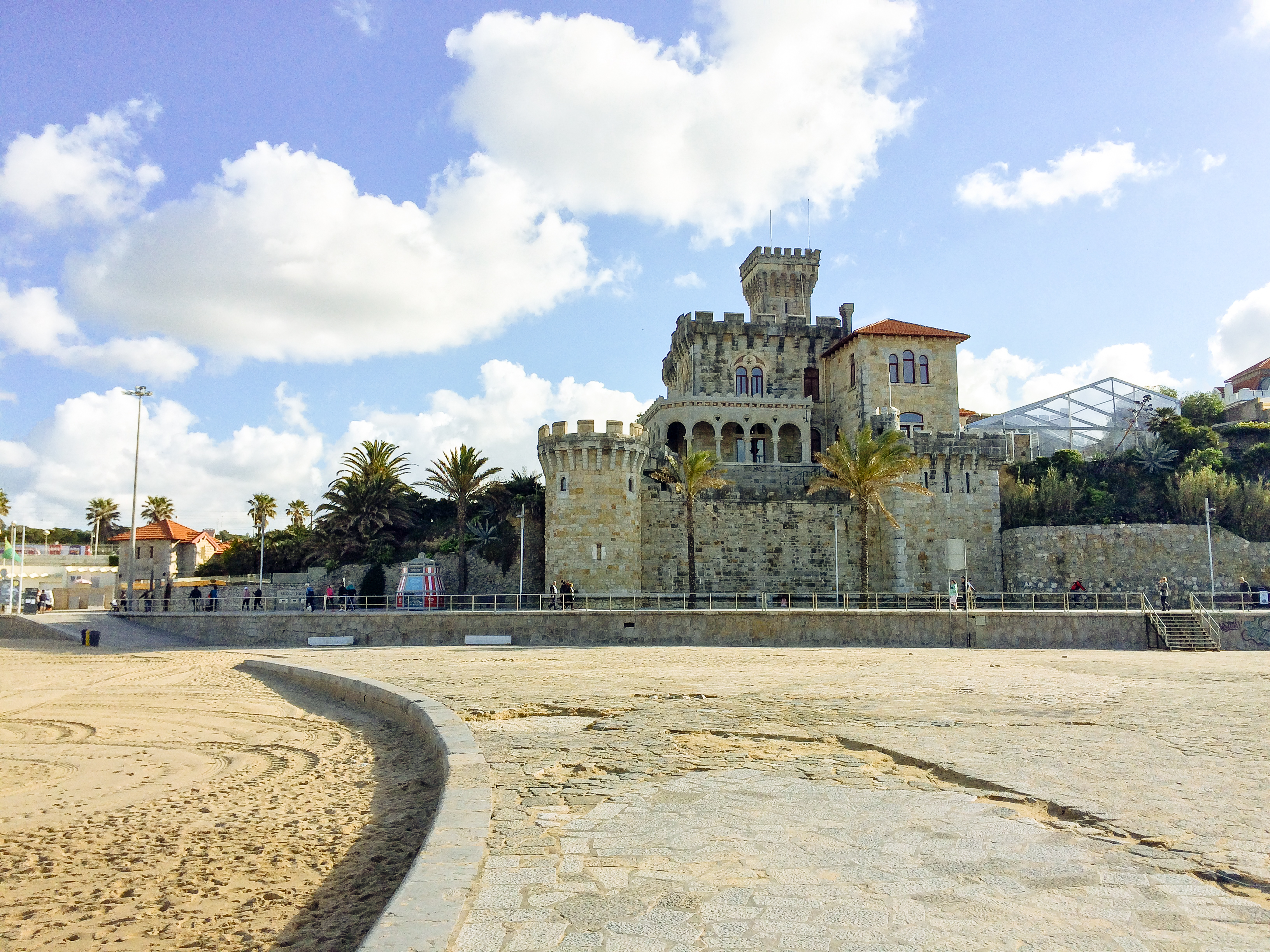 Vista do pontão do Tamariz.